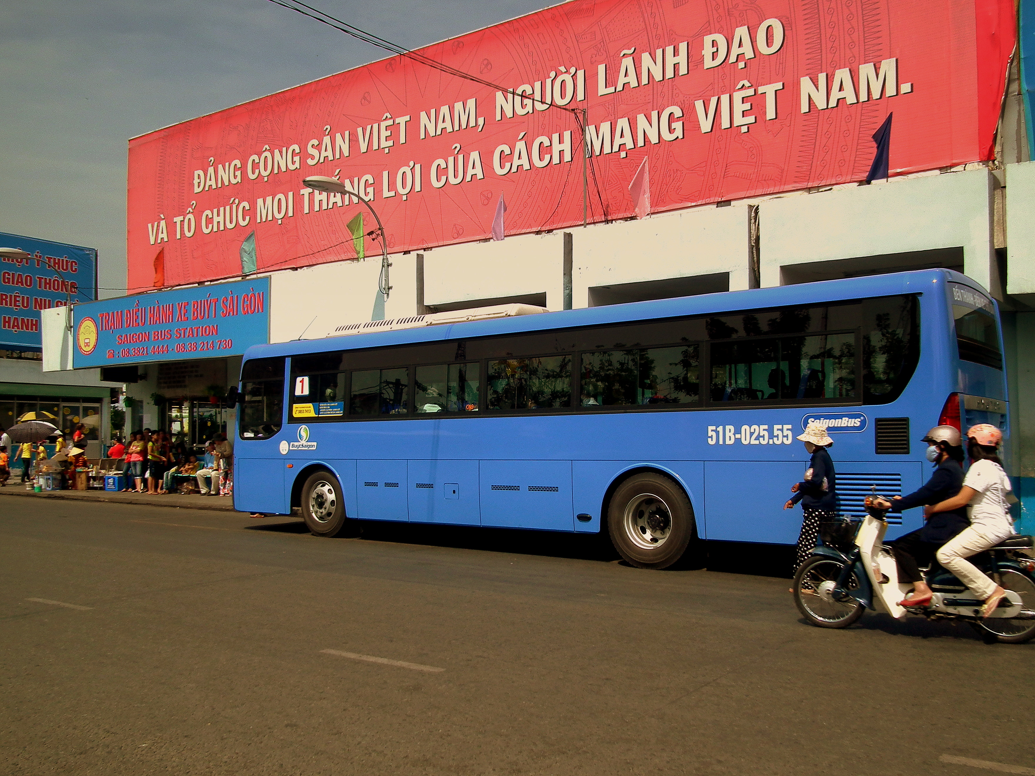 BEN TRANH BUS STATION SAIGON VIETNAM JAN 2012